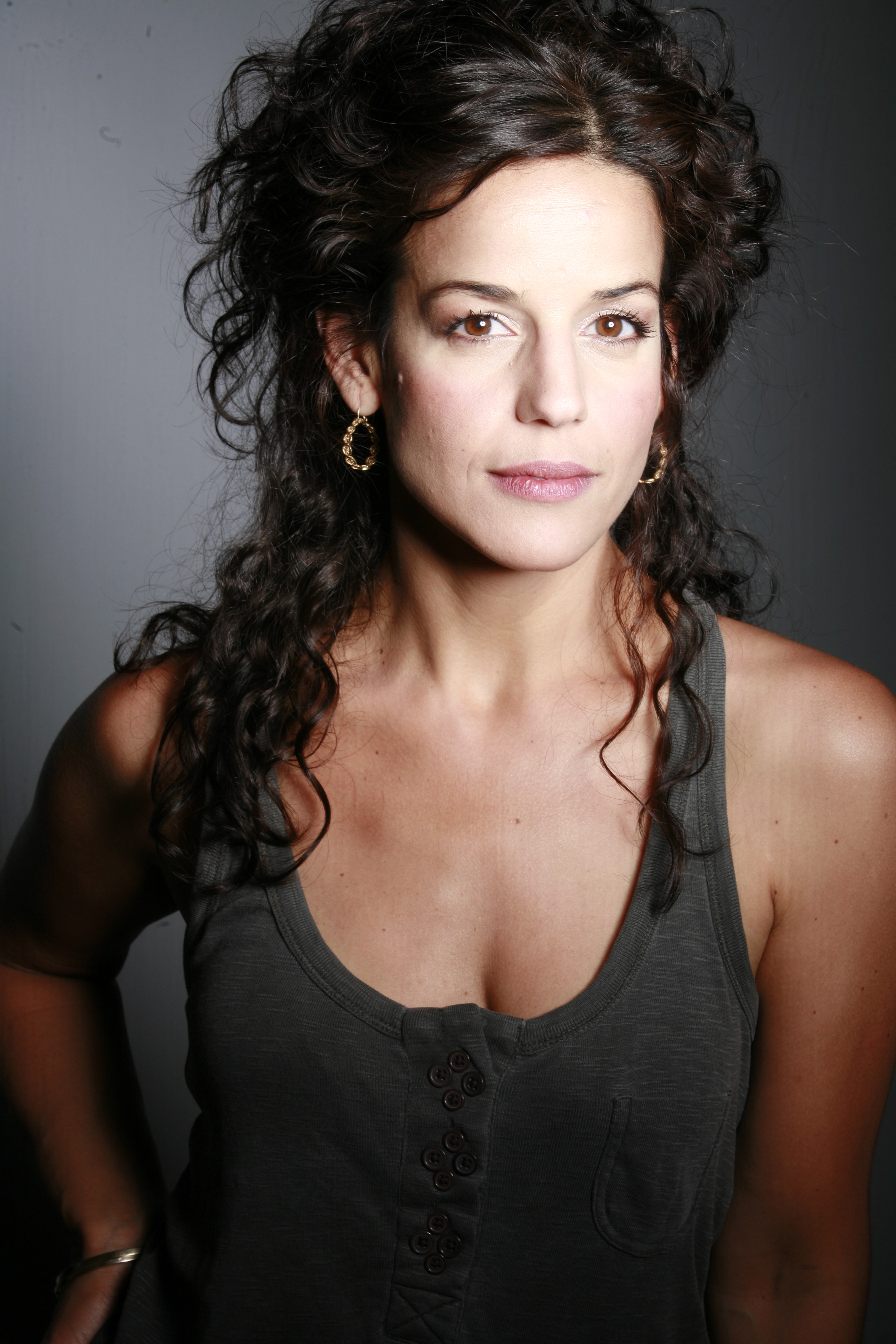 גלית גיאת